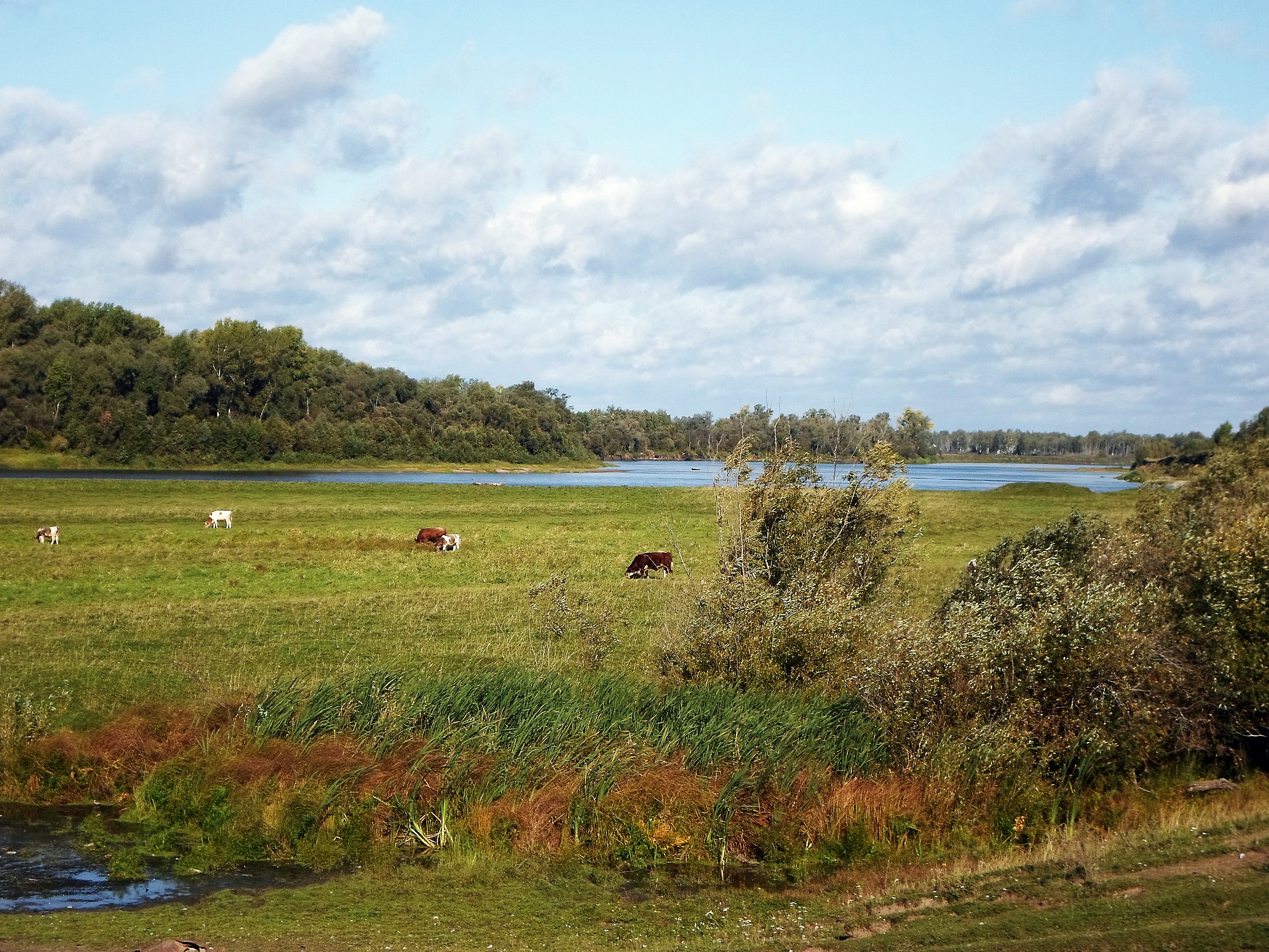 Река Чулым у села Берёзовка. Большеулуйский район Красноярского края.